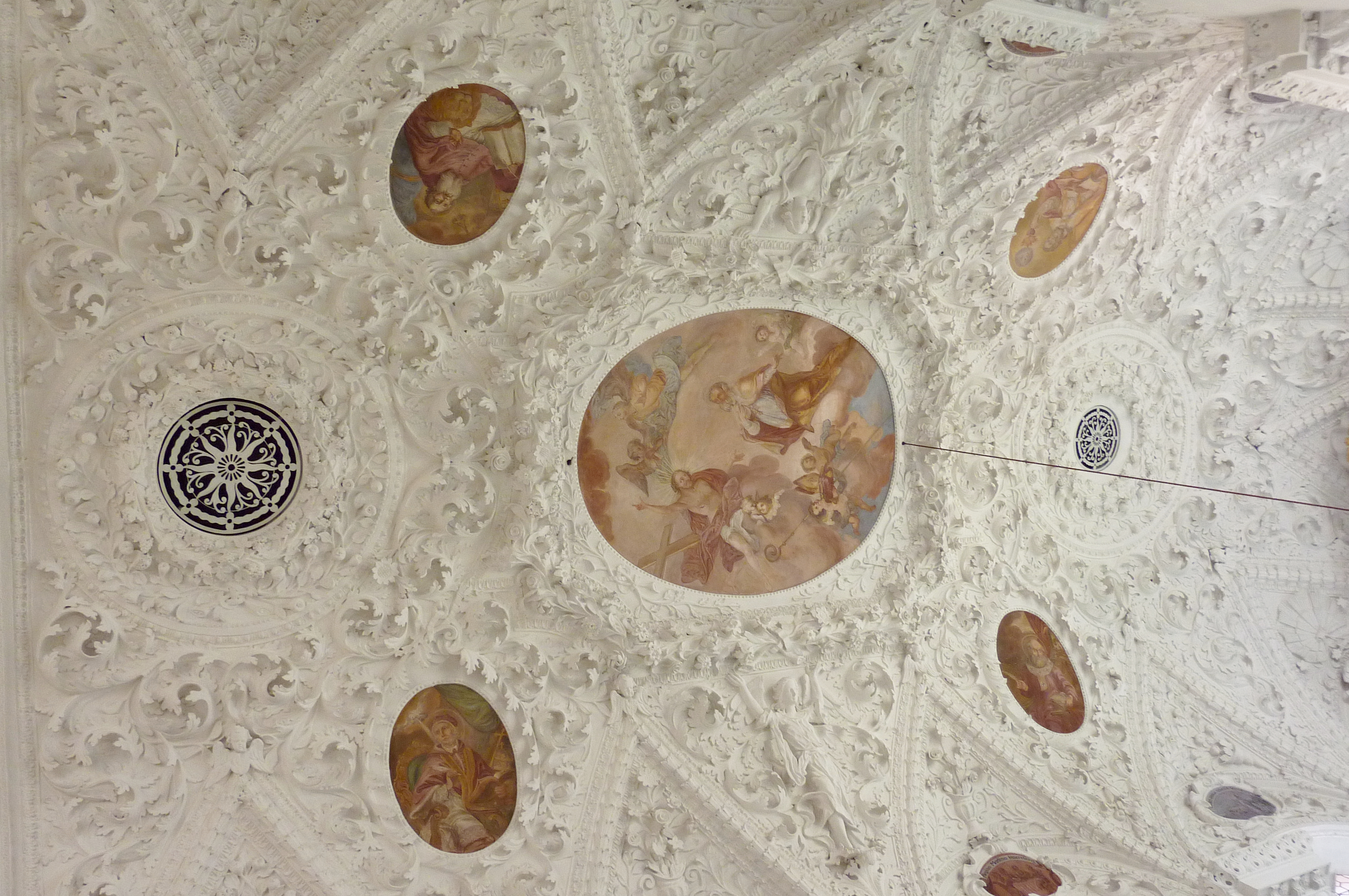 Katholische Pfarrkirche St. Martin in Wertingen im Landkreis Dillingen an der Donau (Bayern), Decke mit Fresken und Wessobrunner Stuck